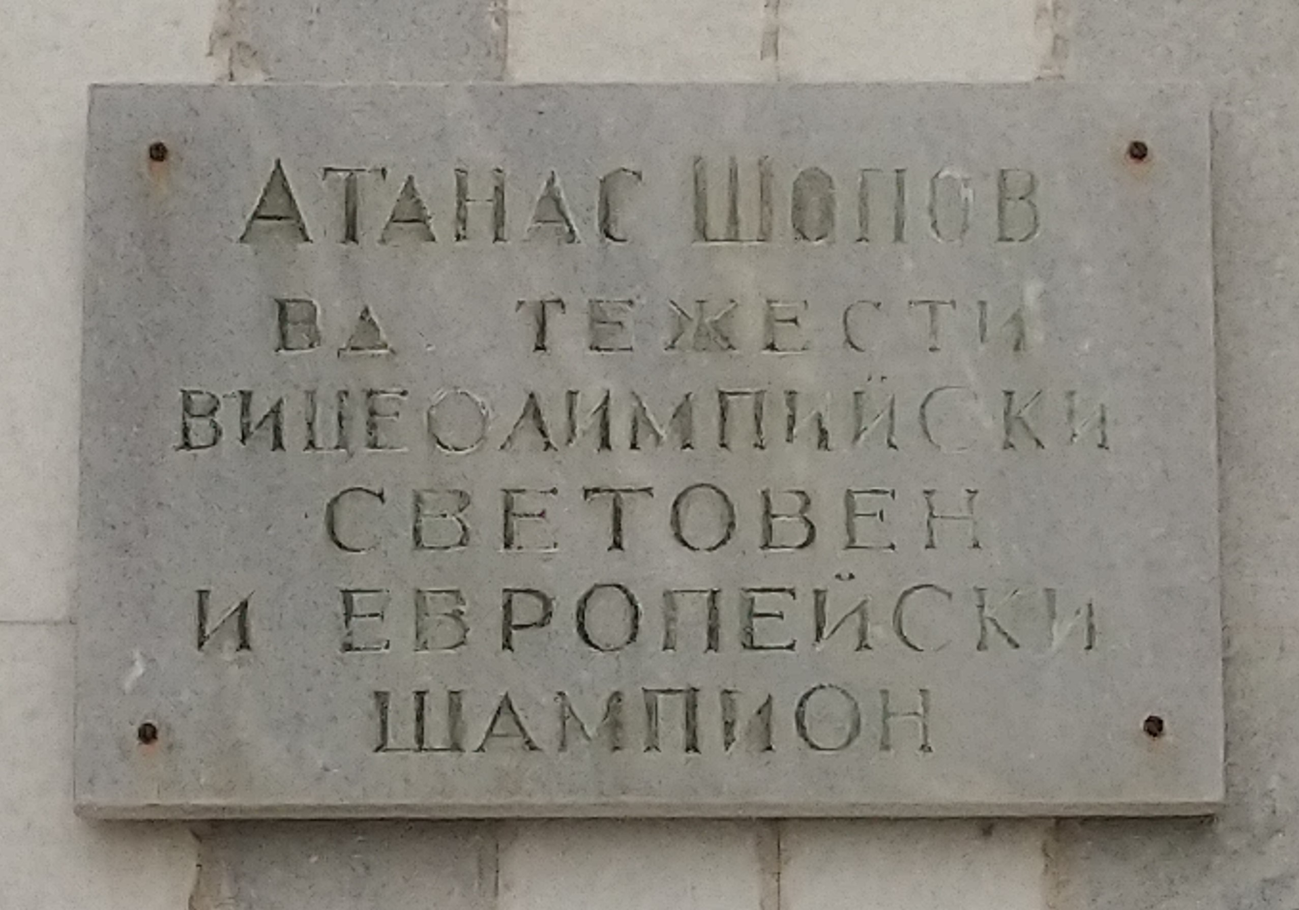 Паметна плоча на спортиста Атанас Шопов (вдигане на тежести) на фасадата на спортна зала "Васил Левски", Пазарджик